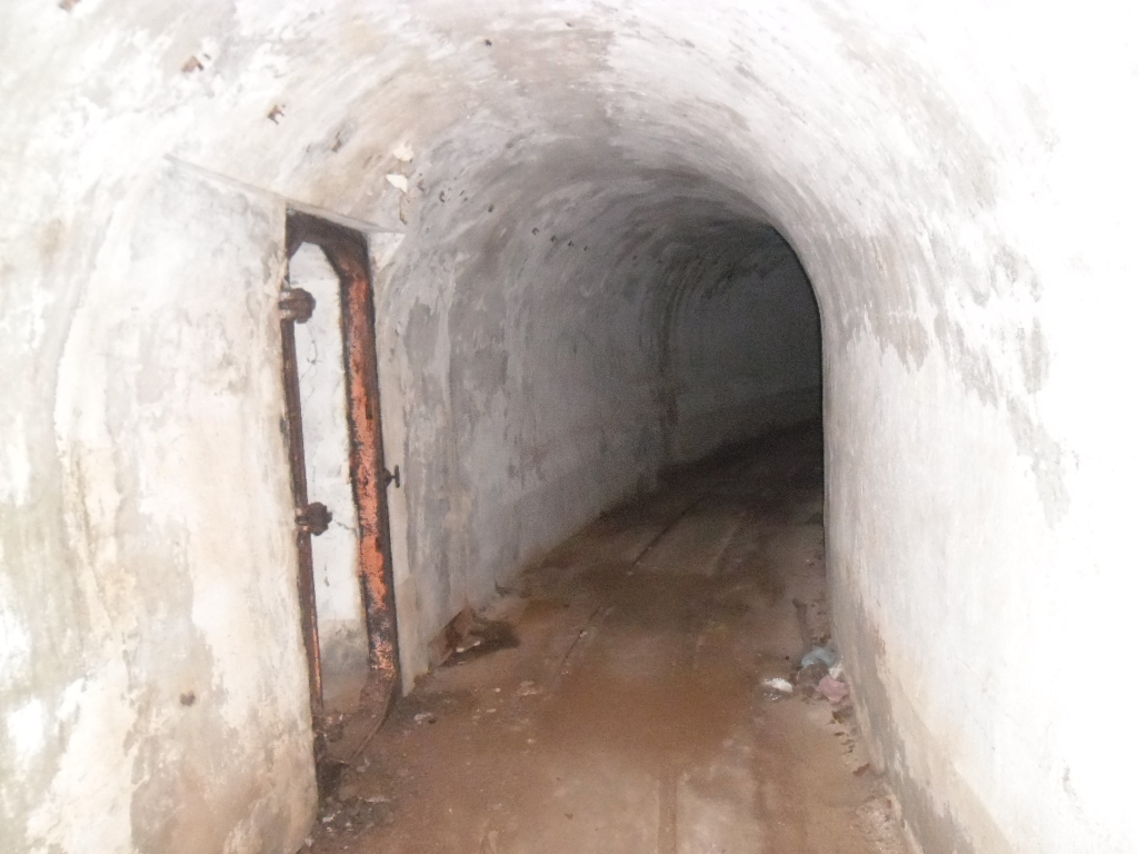 zapušteni vojni objekt bivše JRM (JNA) u Pasaduru na otoku Lastovu